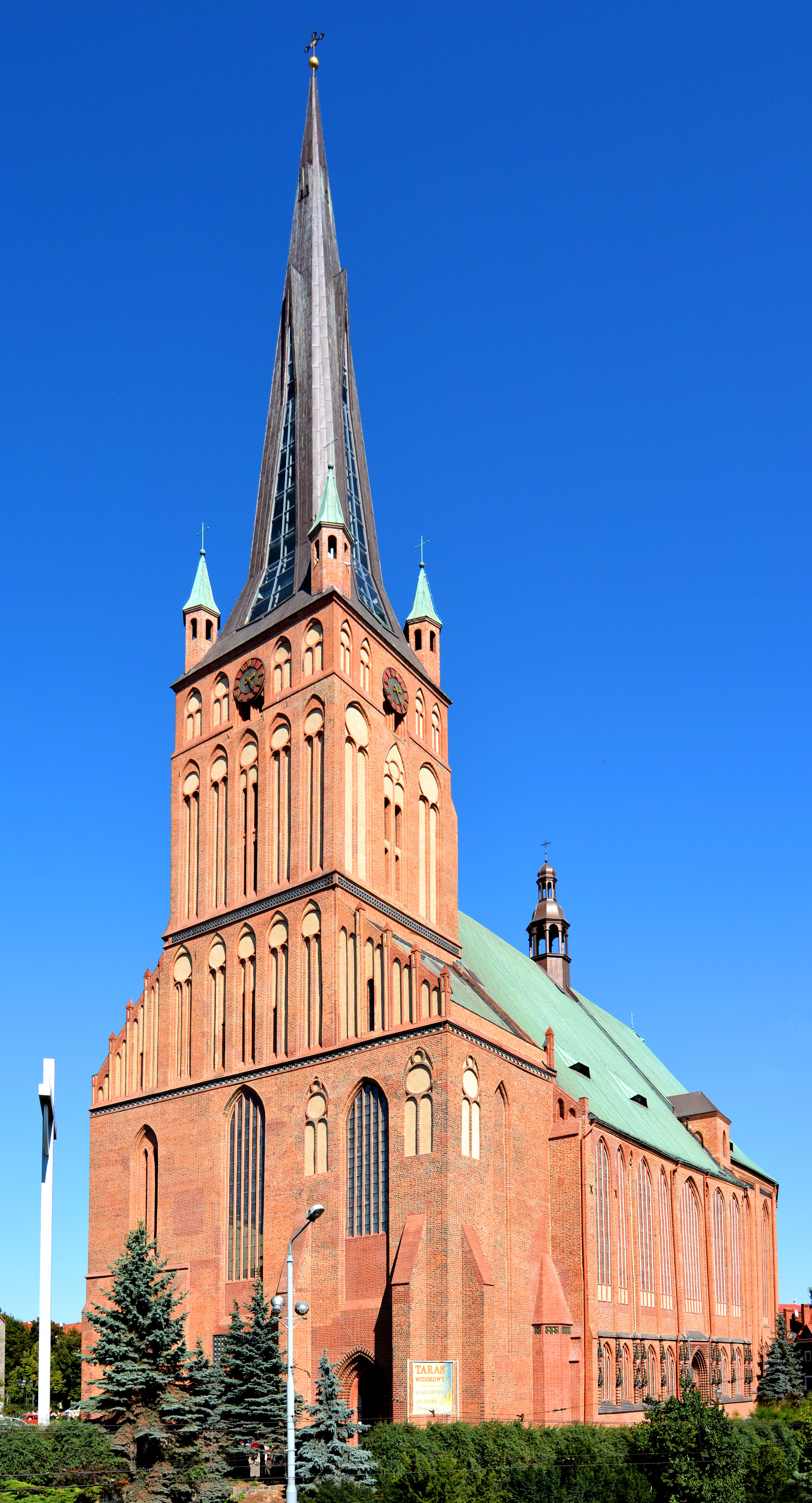 Szczecin, kościół par., ob. archikatedra p.w. św. Jakuba, XII/XIII, 1375-1387, XV, 1972-1982